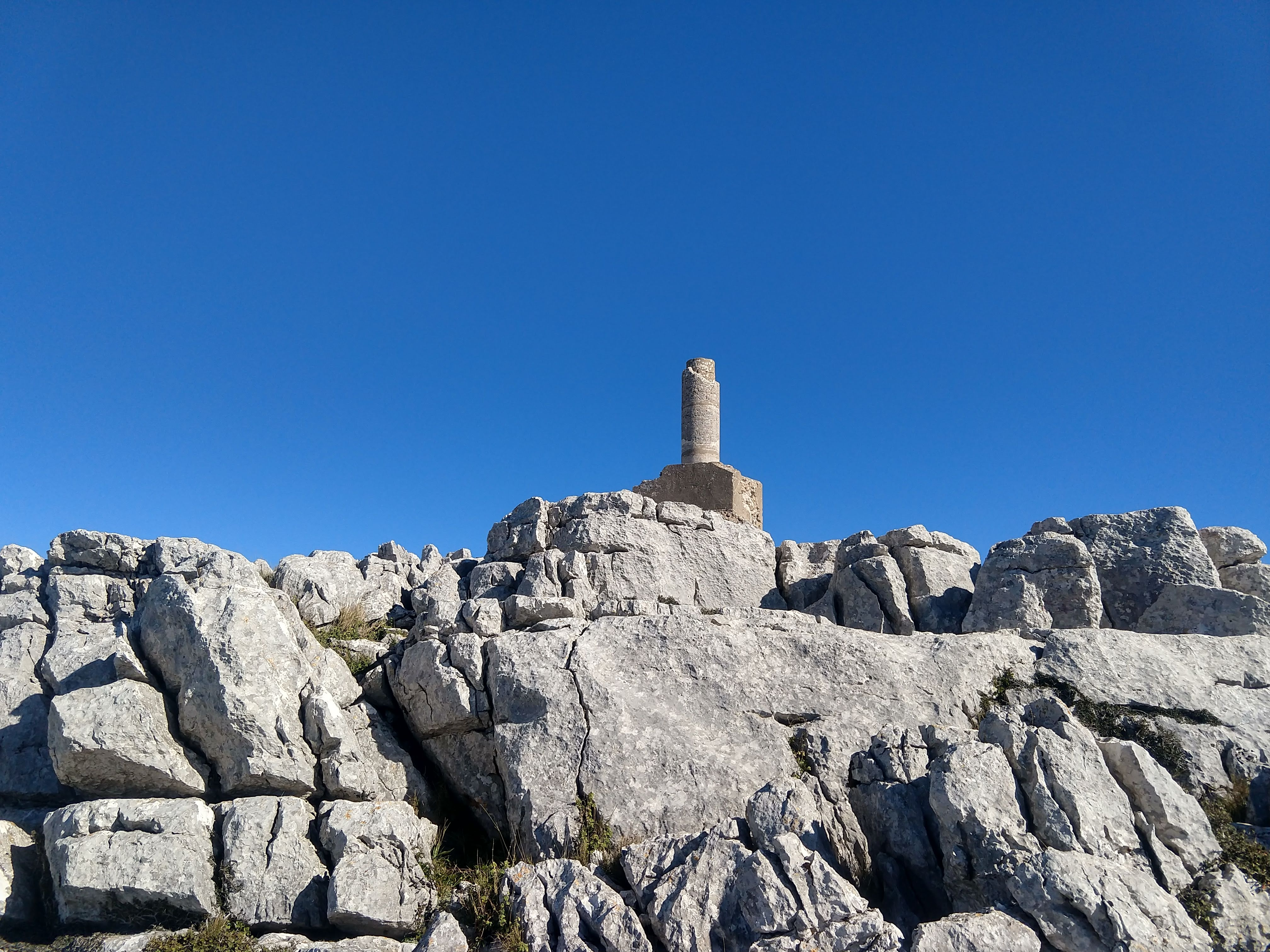 Imagen de la cima del Pico Ventana, en Enero 2020.